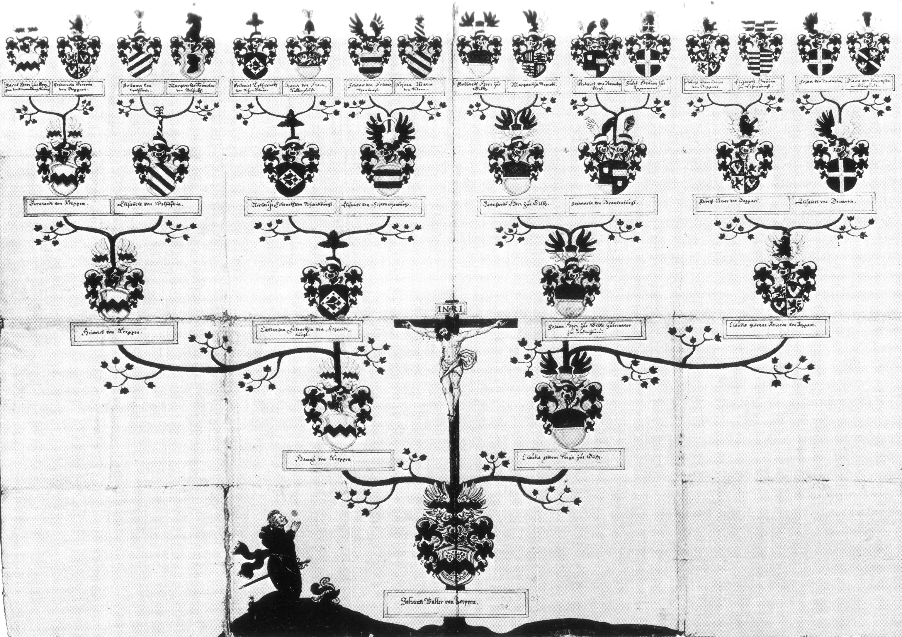 Stammbaum des Ritter Johann Walter von Kerpen (1602-1627) zur Aufnahme in den Malteserorden.